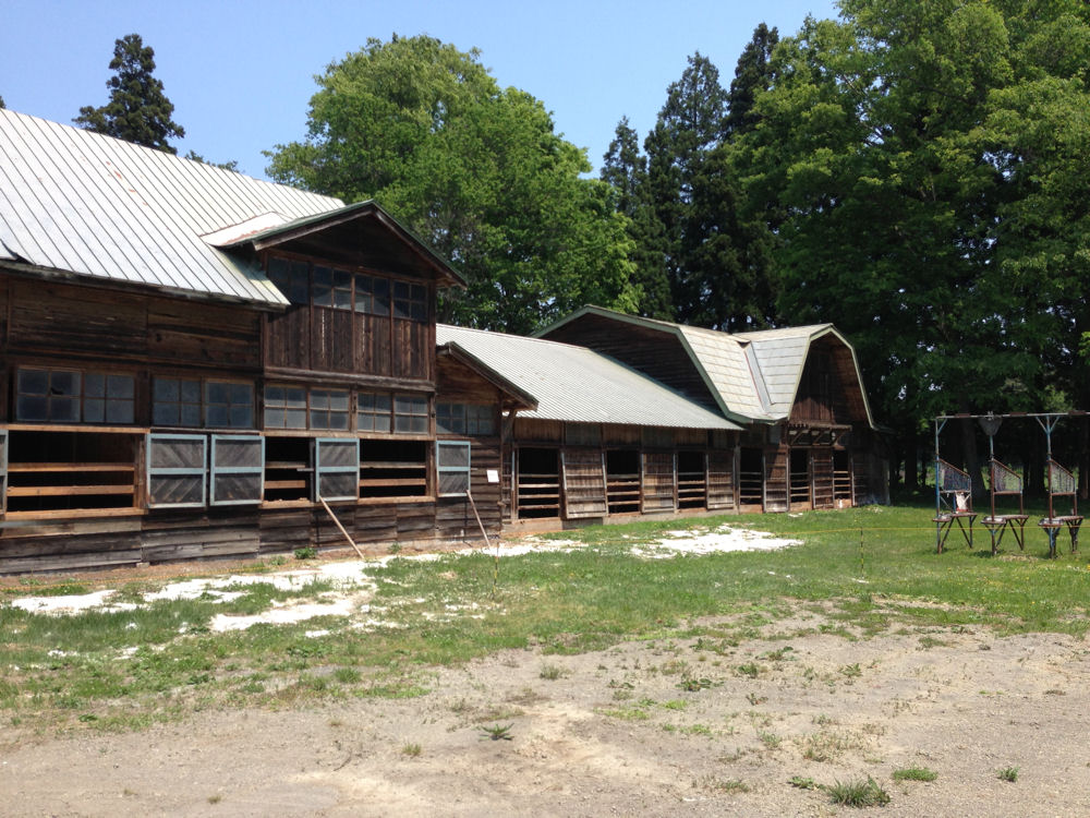 盛田牧場2号厩舎